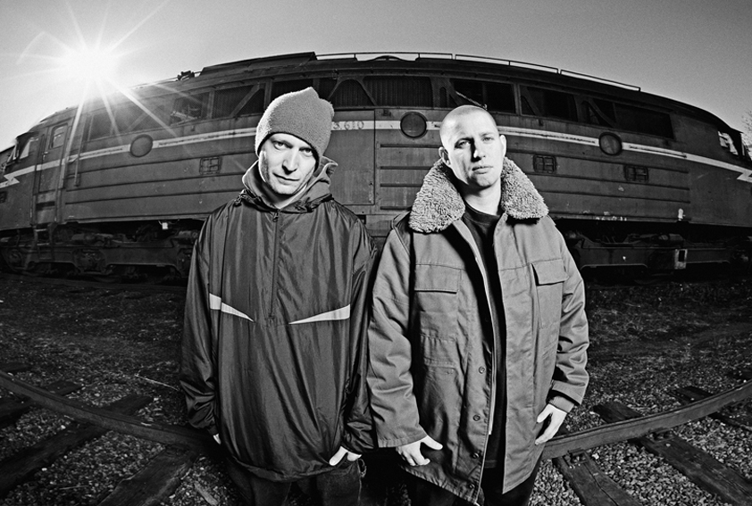 foto: Geir Mogen